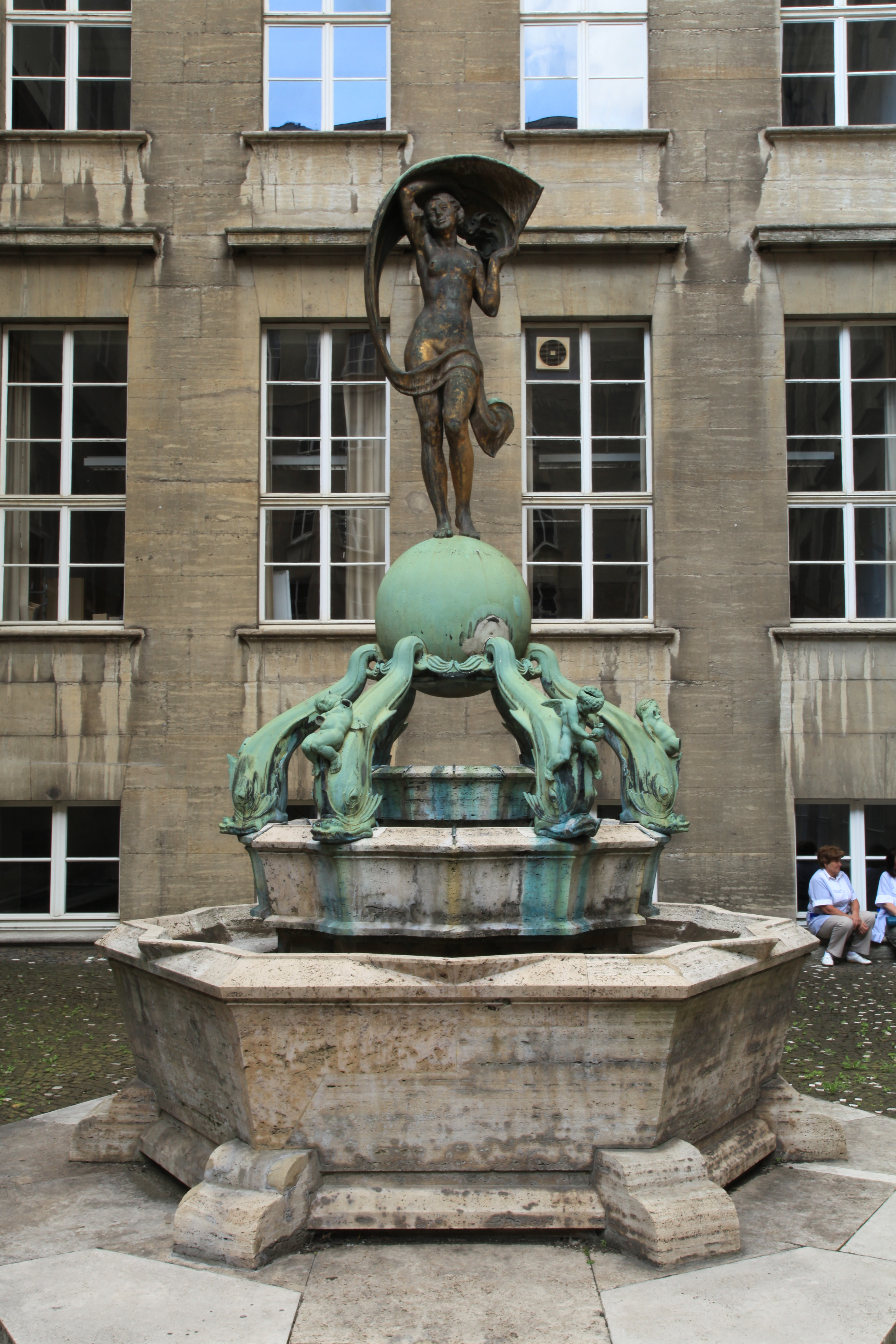 Brunnen des Glücks von August Vogel im Innenhof des Rathauses am Willy-Brandt-Platz in Bochum